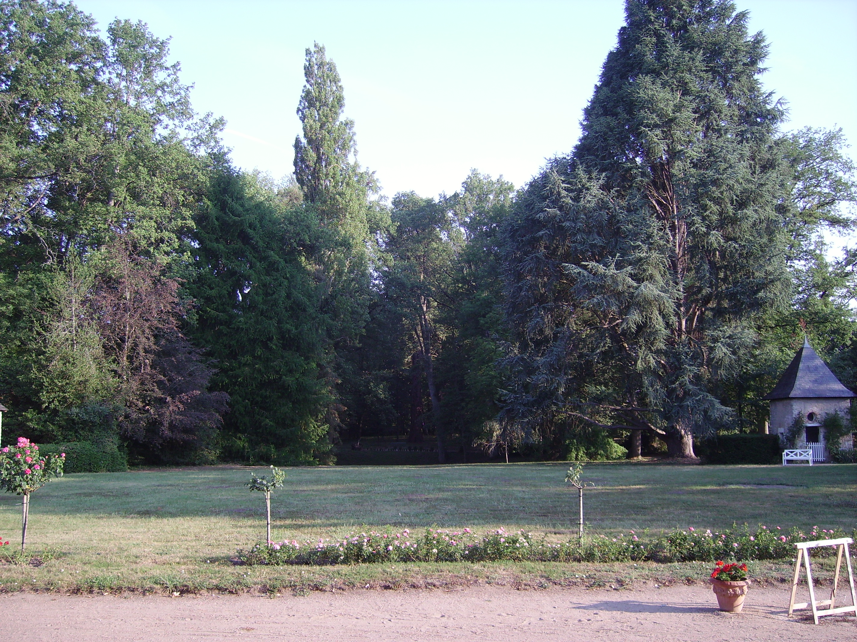 Château of Troussay, France. Park. Château de Troussay, France, Loir et Cher. Parc.